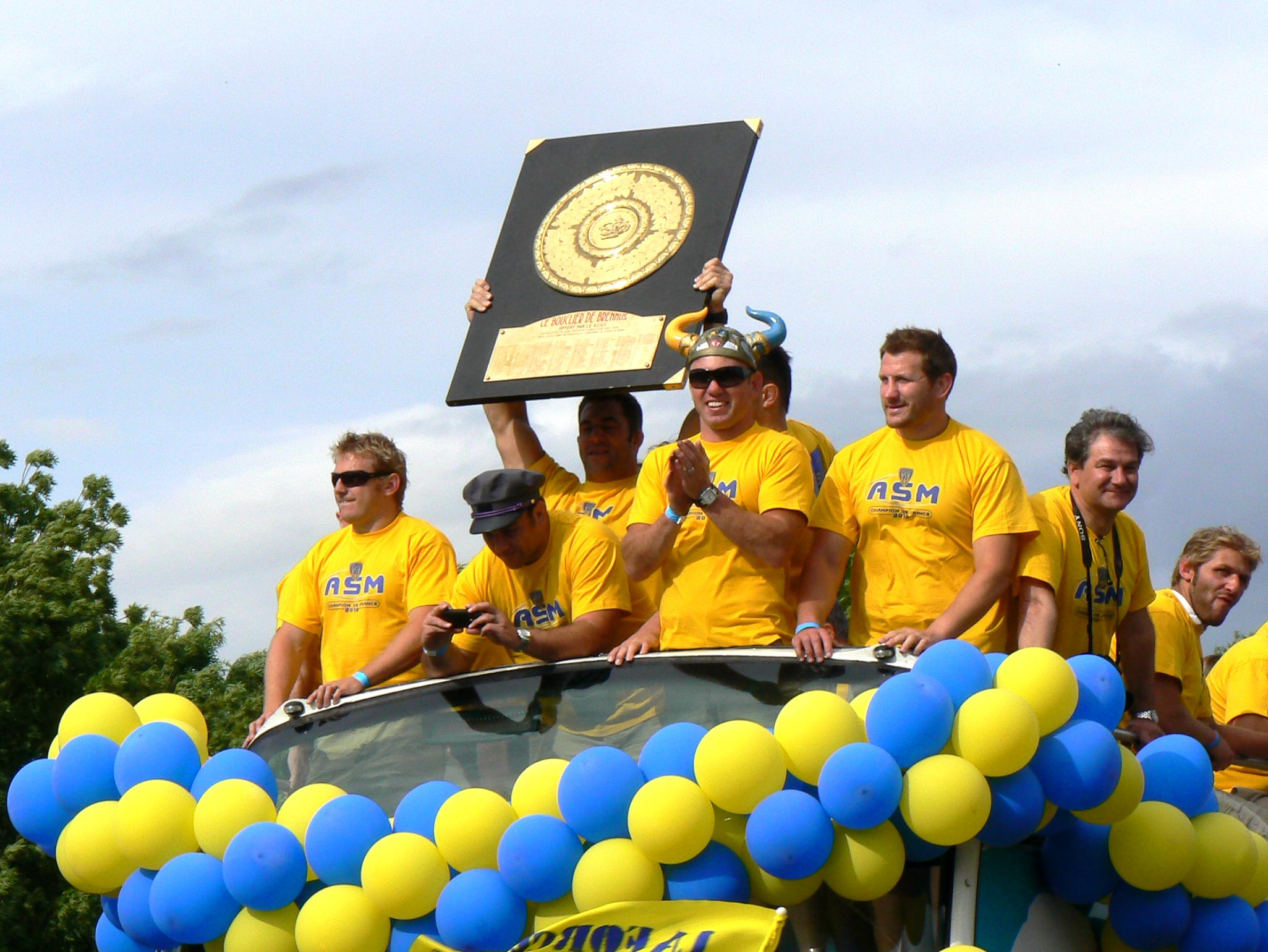 Les joueurs de l'ASM Clermont Auvergne, consacré champion de France de rugby la veille, paradent dans les rues de Clermont-Ferrand avec le bouclier de Brennus.